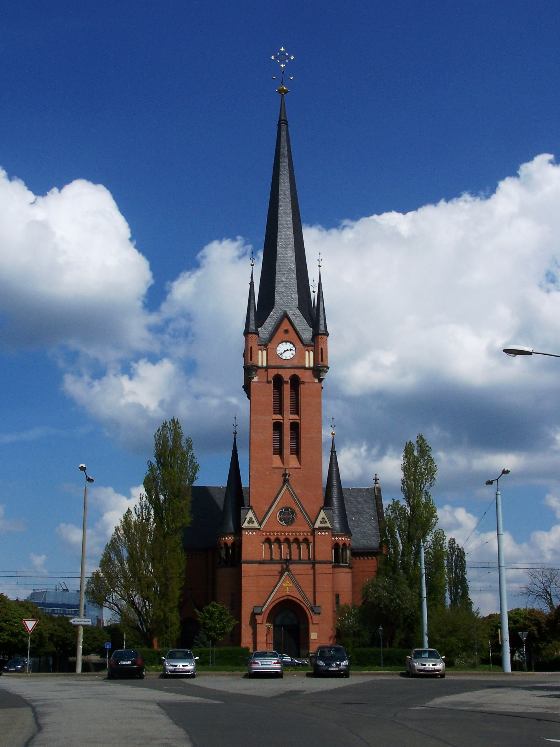 Petrikirche in Dresden